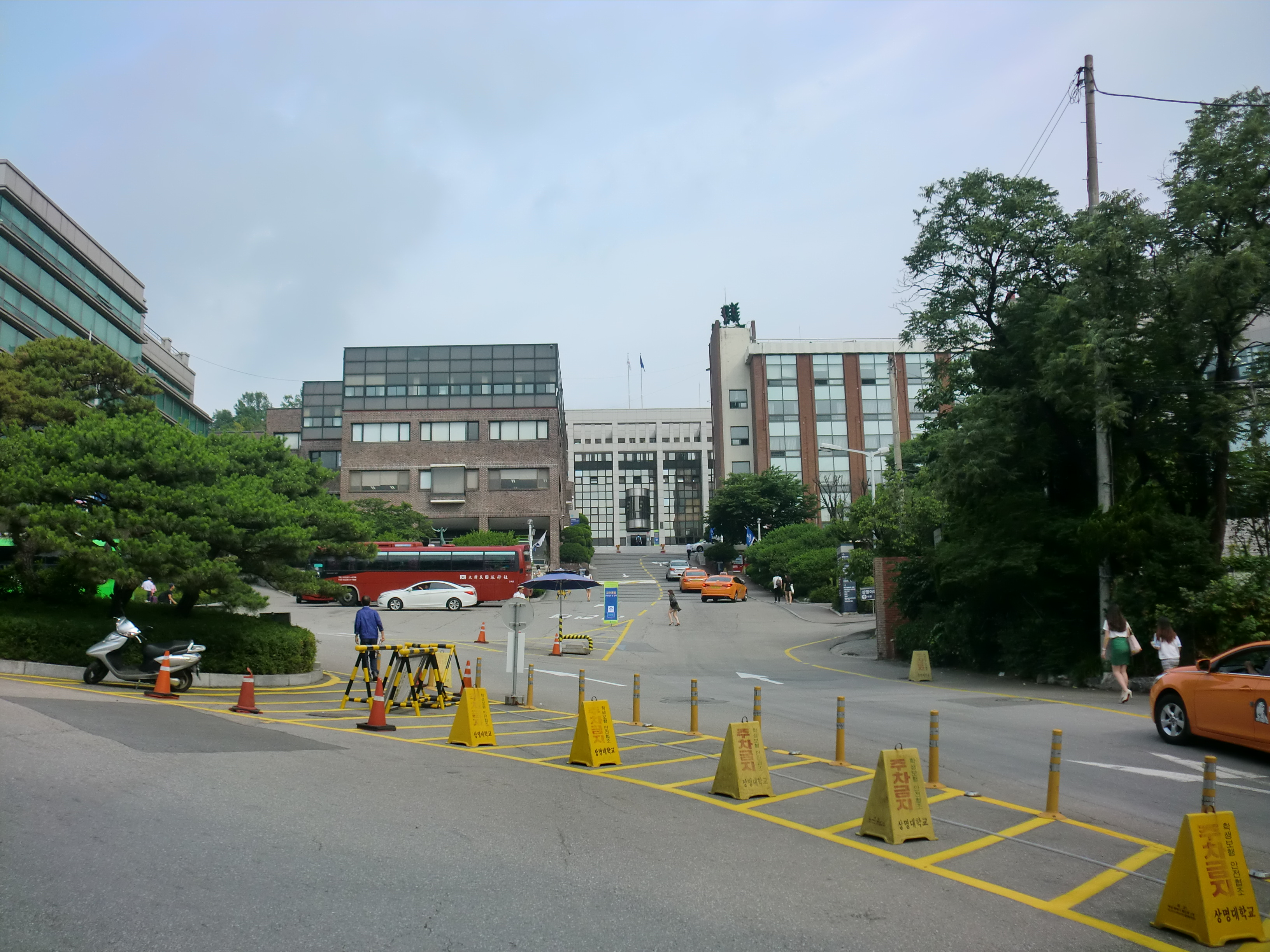 서울특별시 종로구에 있는 상명대학교